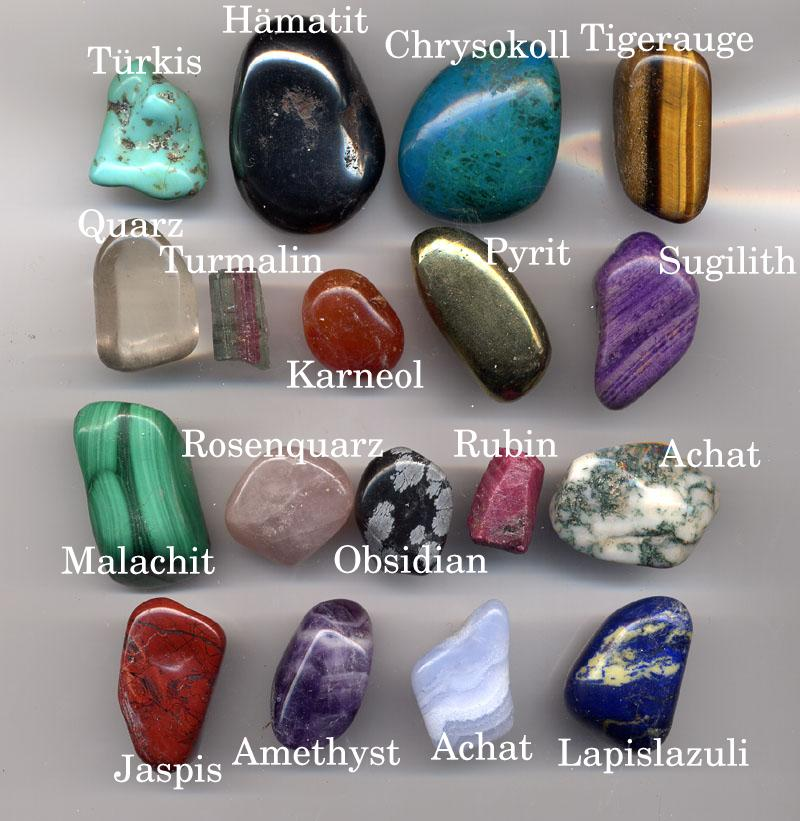 Verschiedene polierte Schmucksteine